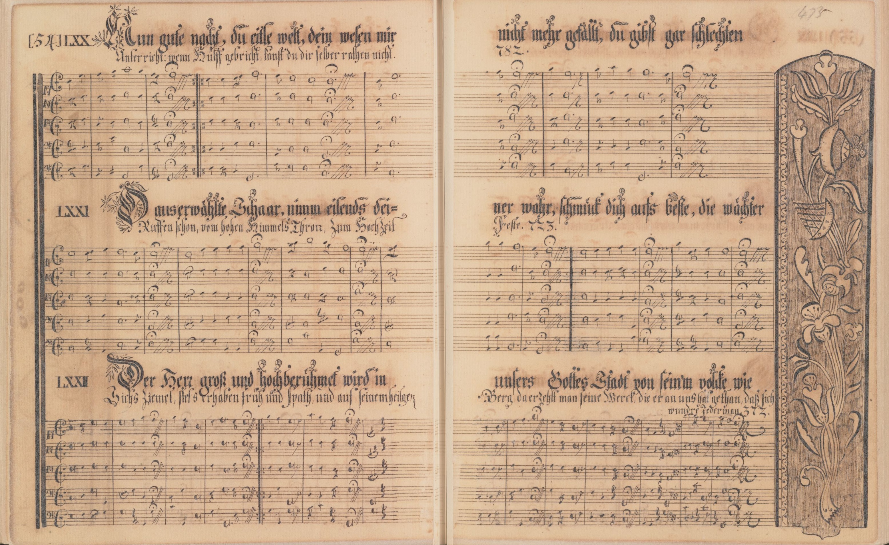 Ephrata Community, Die bittre Gute, oder Das Gesäng der einsamen Turtel-Taube, Manuscript hymnal, 1746.